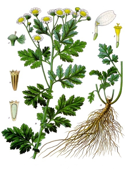 Mutterkraut. A Wurzel, B blühende Pflanze. 1 Randblüte; 2 Scheibenblüte; 3 Fruchtboden mit Früchtchen und Hüllkelchblättern; 4 Früchtchen; 5 dasselbe im Längsschnitt. A, B natürliche Grösse; 1—5 vergrössert.